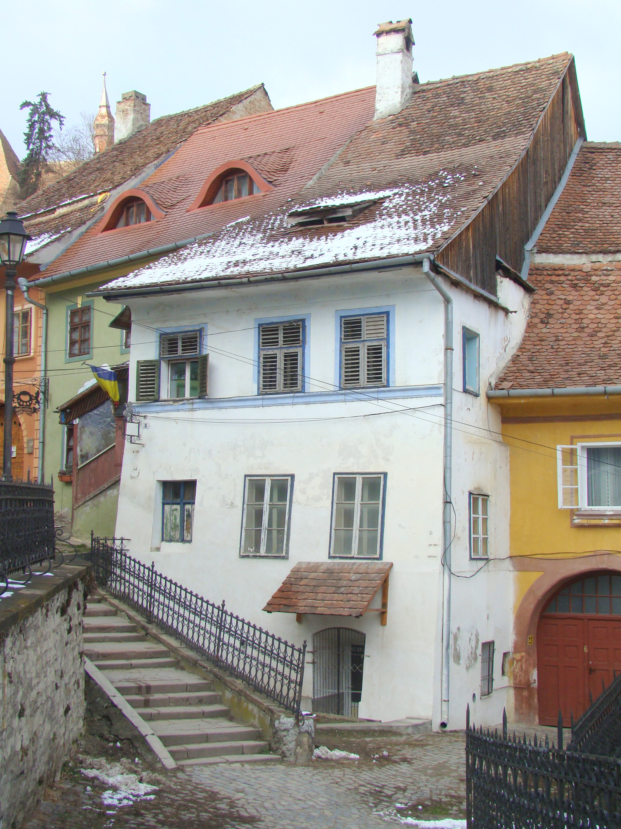 Casă, municipiul Sighișoara, Piața Oberth Hermann 5 1700 - 1750, sf. sec. XIX-înc. sec. XX